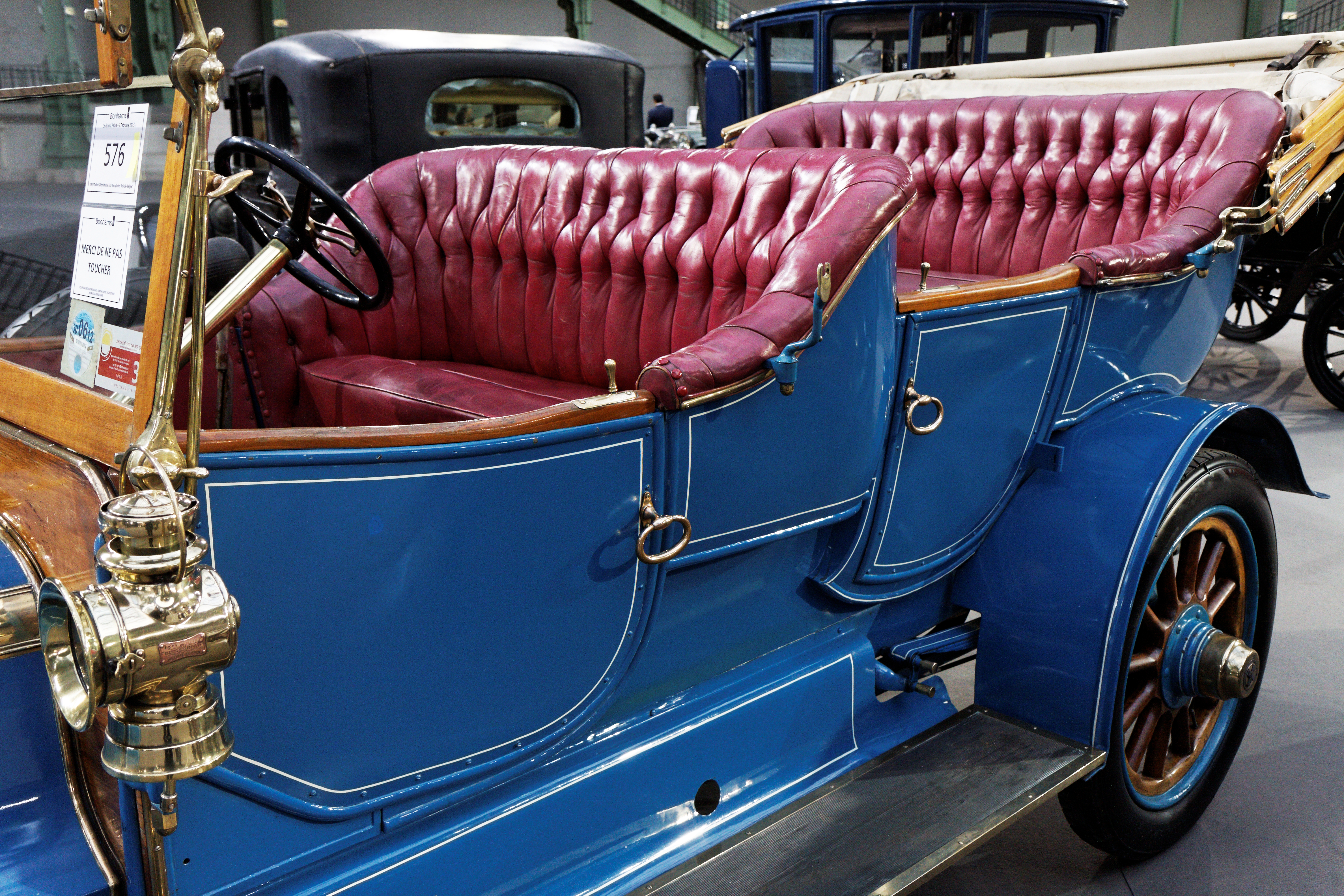 Une Talbot 25HP model 6AS six cylinder Roi des Belges tourer de 1910.